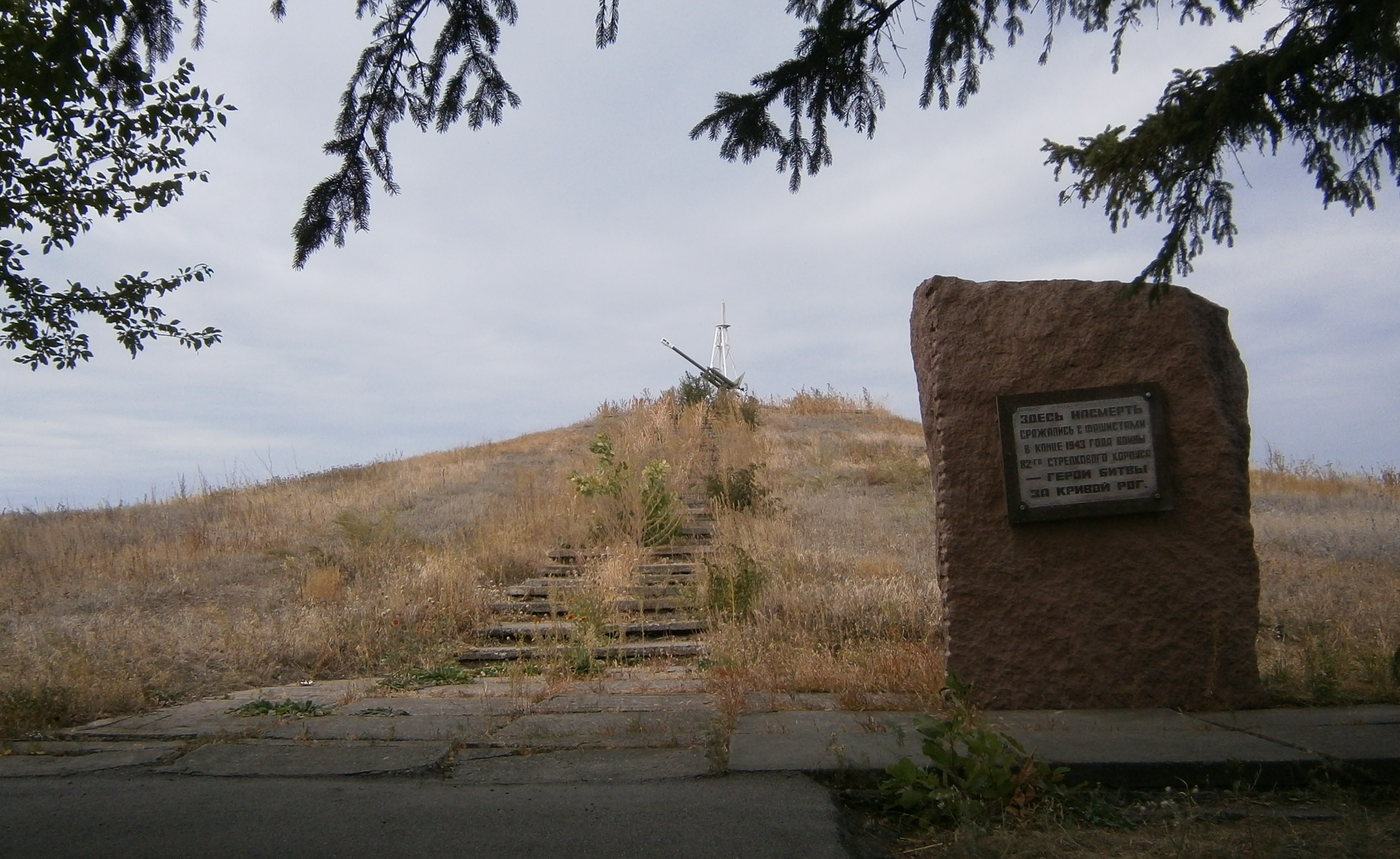 Місце боїв 82 стрілецького корпусу, меморіальний комплекс «Могила Баба», розташований в поляхКривий Ріг, В 4,6 км. на схід від пл. 40 річчя Перемоги (веселі Терни), найближче селище - Кам'яне поле. Напис на камні - "Здесь насмерть сражались с фашистами в конце 1943 года воины 82-го стрелкового корпуса - герои битвы за Кривой Рог"